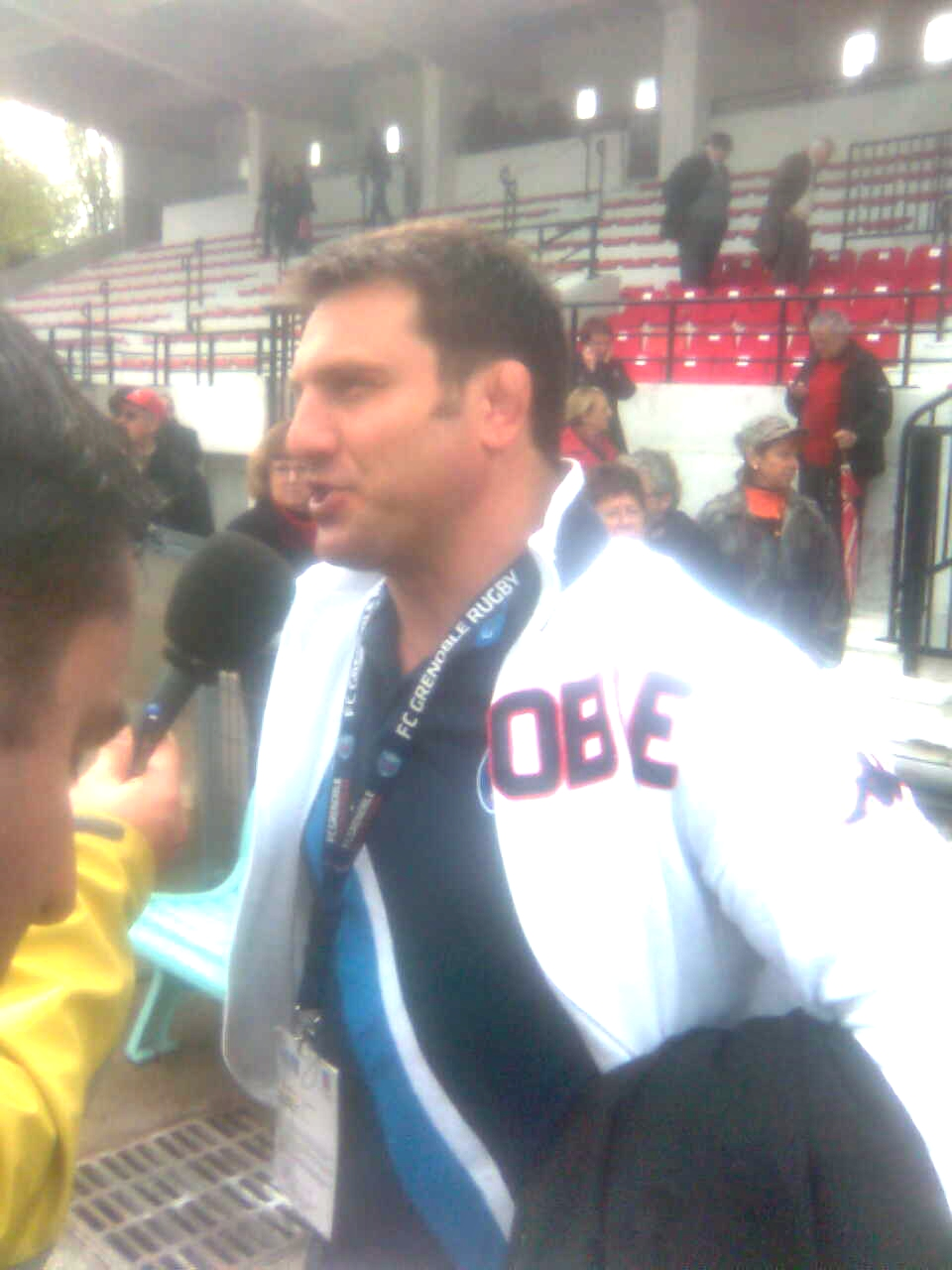 Photo de Fabrice Landreau, manager du FC Grenoble, après le match US Oyonnax - FCG du 02/05/2010 (29e journée de Pro D2 2009-2010)